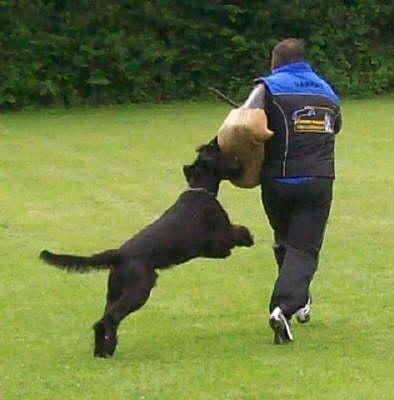 Ziska von der Talmühle beim Schutzhundesport